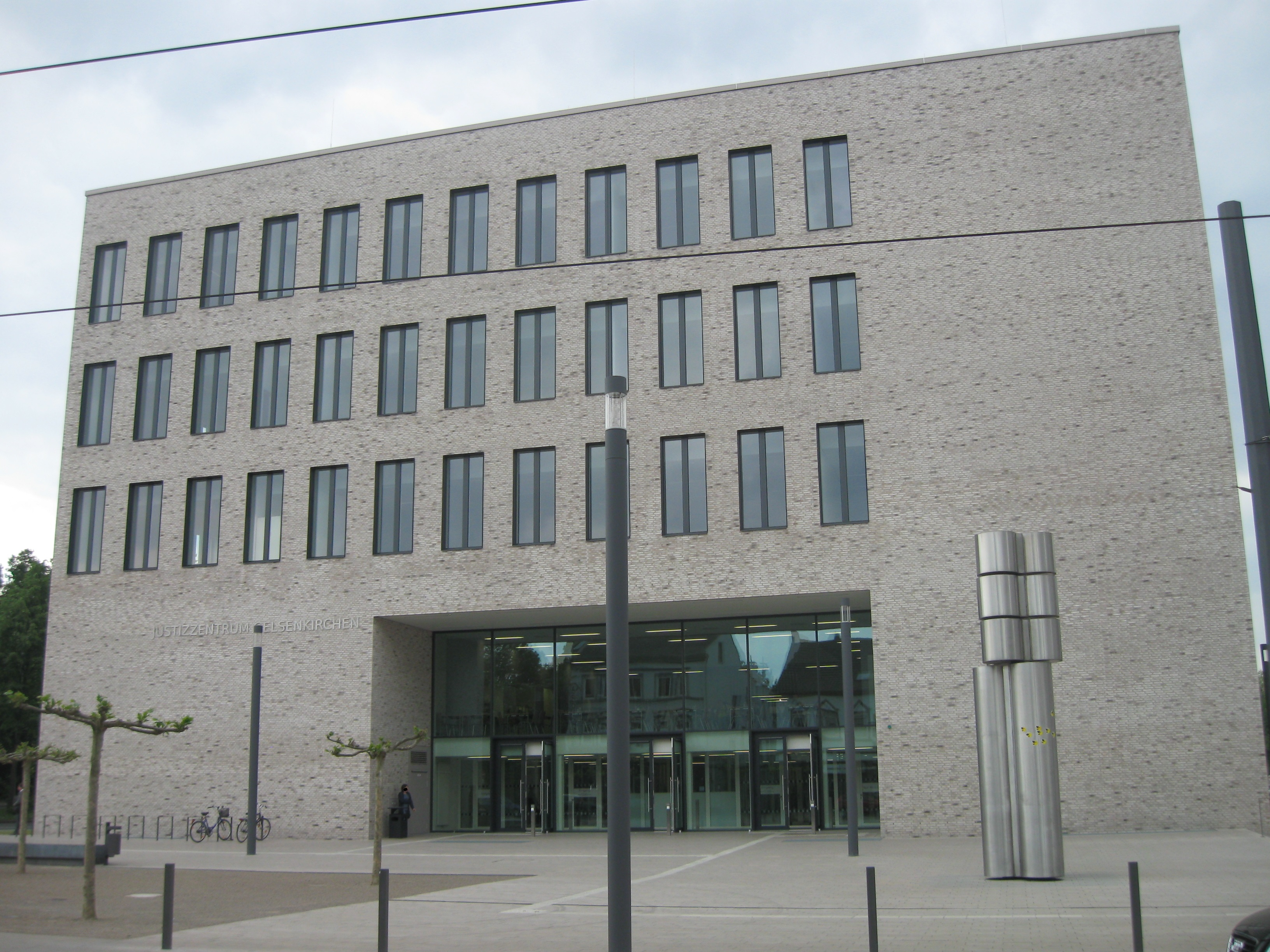 Hauptfassade (Westseite) des Justizzentrums Gelsenkirchen (Bochumer Straße 79, errichtet 2013–2015). Im Justizzentrum Gelsenkirchen sind seit Januar 2016 das Amtsgericht Gelsenkirchen, das Arbeitsgericht Gelsenkirchen und das Sozialgericht Gelsenkirchen untergebracht. Rechts vorn die bewegliche Skulptur von Günter Tollmann (1973). Sie stand bis Ende 2015 vor dem bisherigen Dienstgebäude des eh. Amtsgerichts Gelsenkirchen-Buer und wurde Anfang 2016 vor das neue Justizzentrum im Süden der Stadt versetzt.